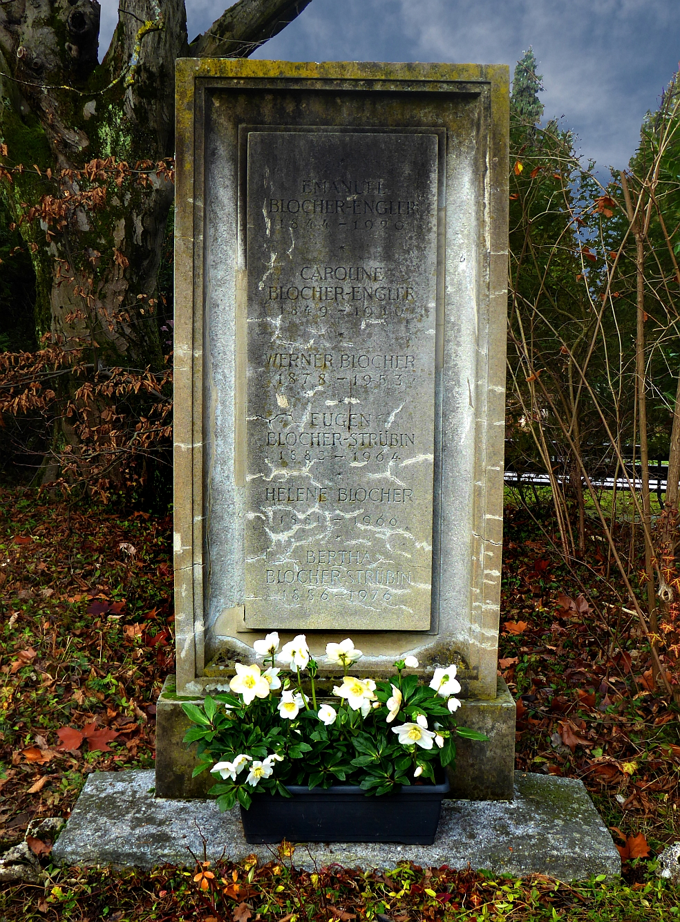 Eugen Blocher-Strübin (1882–1964), Dr.jur., Zivilgerichtspräsident, Bundesrichter, SP Politiker, Parteipräsident, Grab auf dem Friedhof Wolfgottesacker, Basel